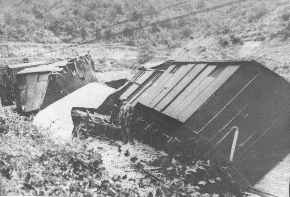 1941 brachten Partisanen auf dem Streckenabschnitt Donji Vakuf–Jajce einen Zug zum Entgleisen.